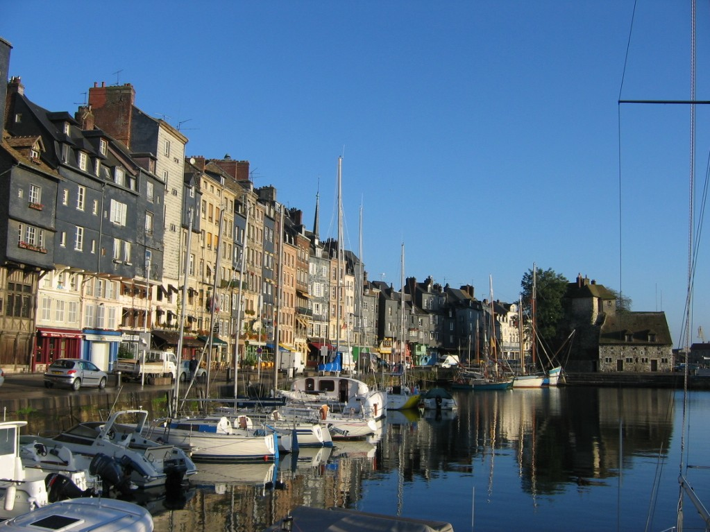 Vieux bassin Honfleur, Calvados, Normandie ; Source : Photographie personnelle prise par l'utilisateur Urban, octobre 2004, GFDL.